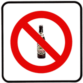 Schild gegen Alkohol